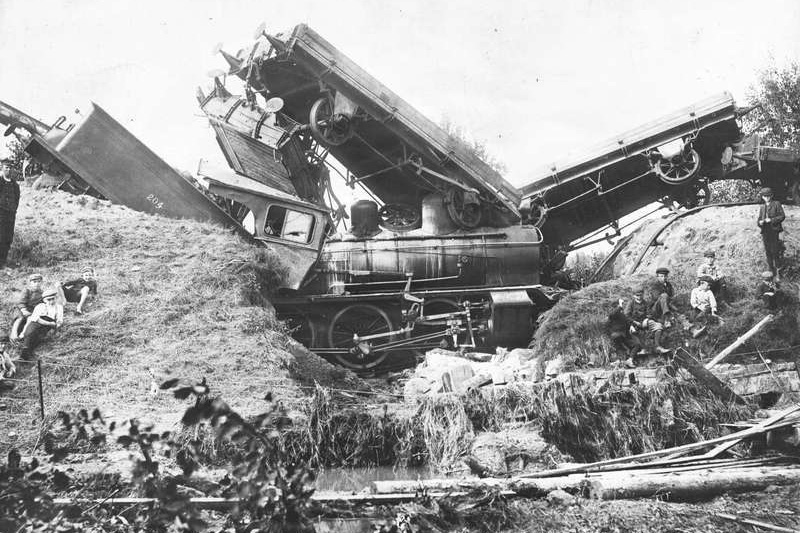 Jernbaneulykken på Krøderbanen 2. august 1910 (Sysleulykken).